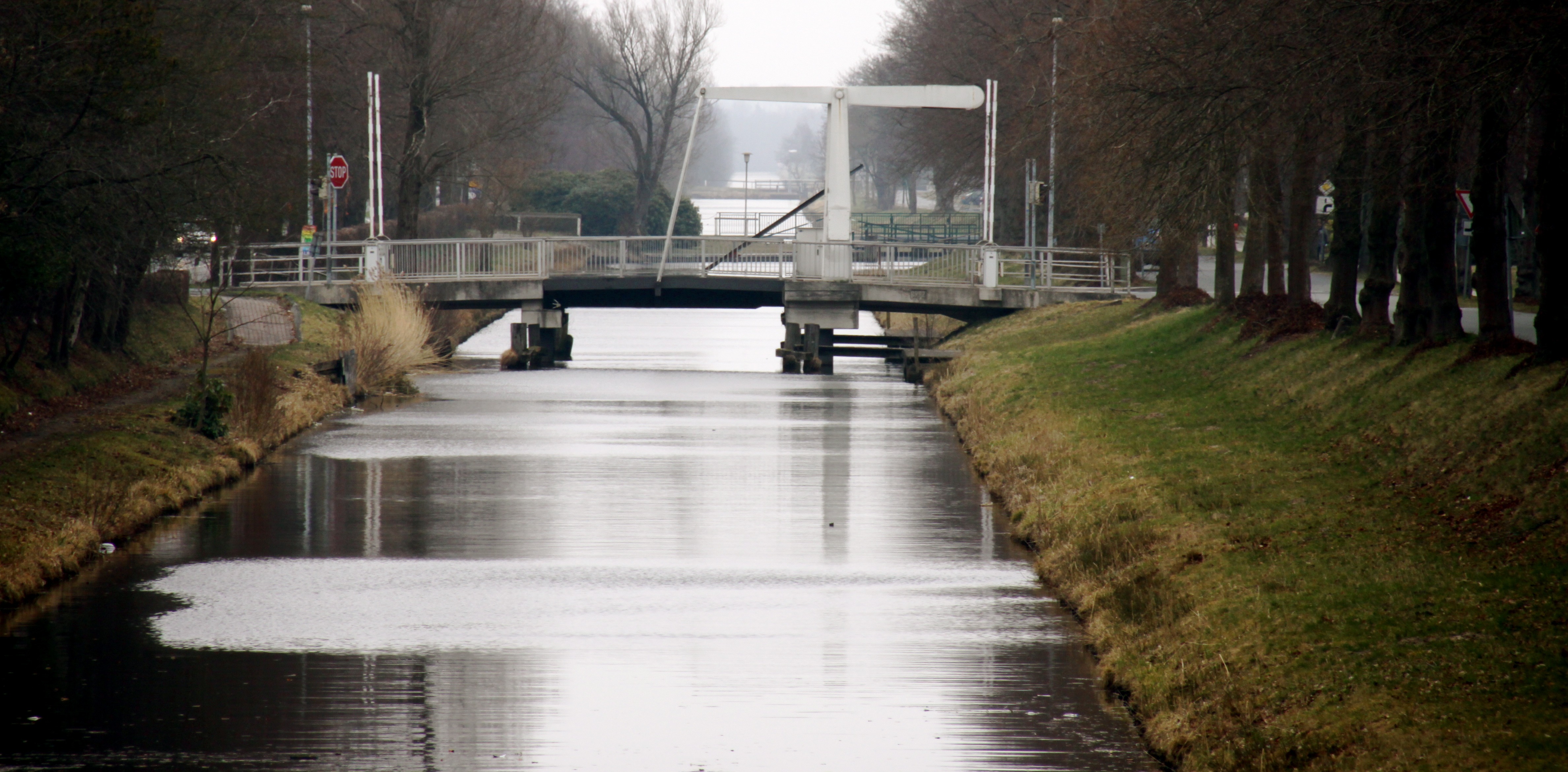 Klappbrücke über den Fehnkanal bei Wiesmoor